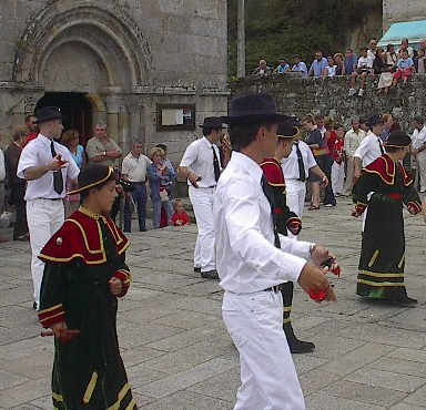 Danza do Hío